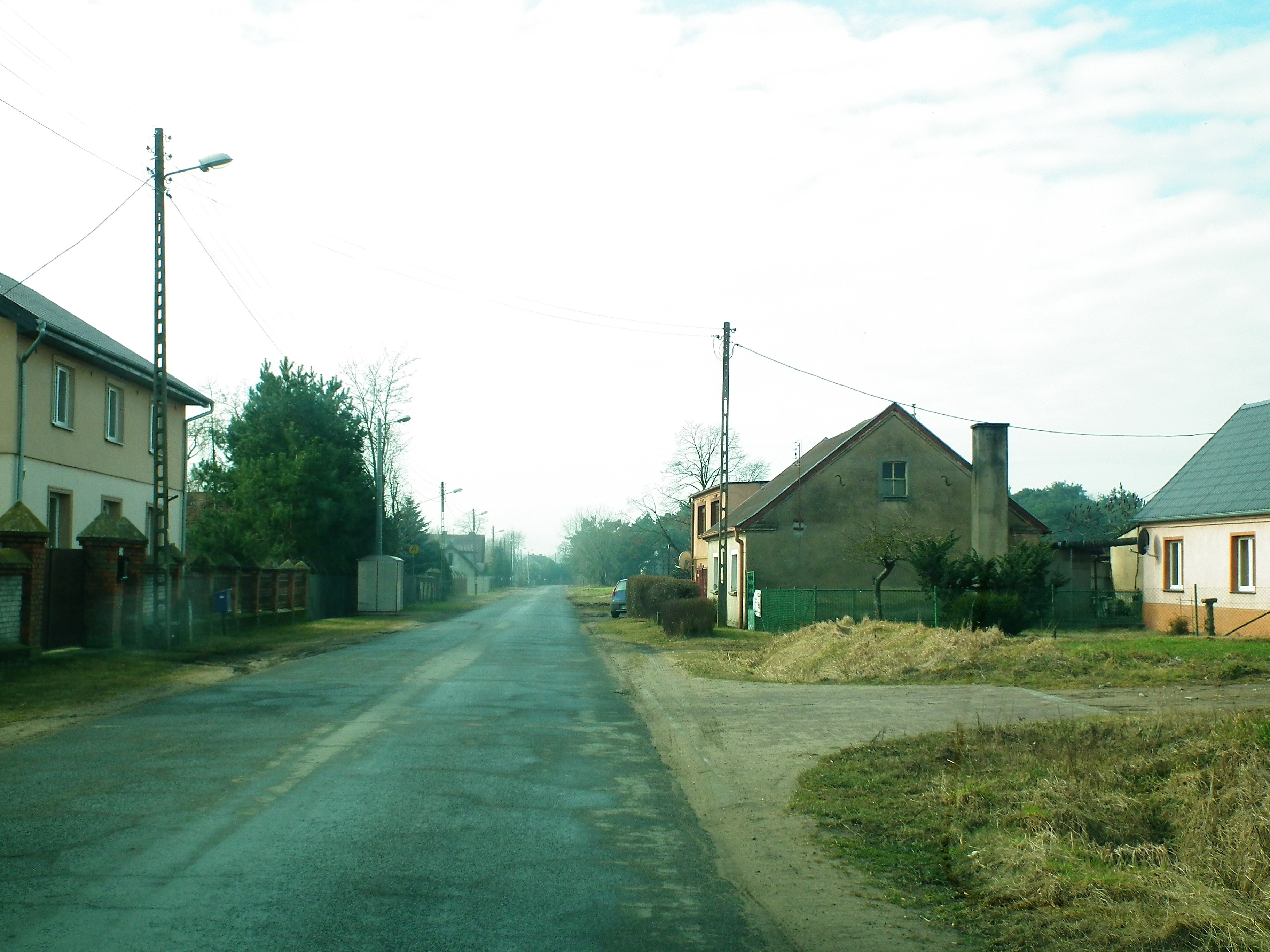 Piotrowo Drugie, gm. Czempiń.